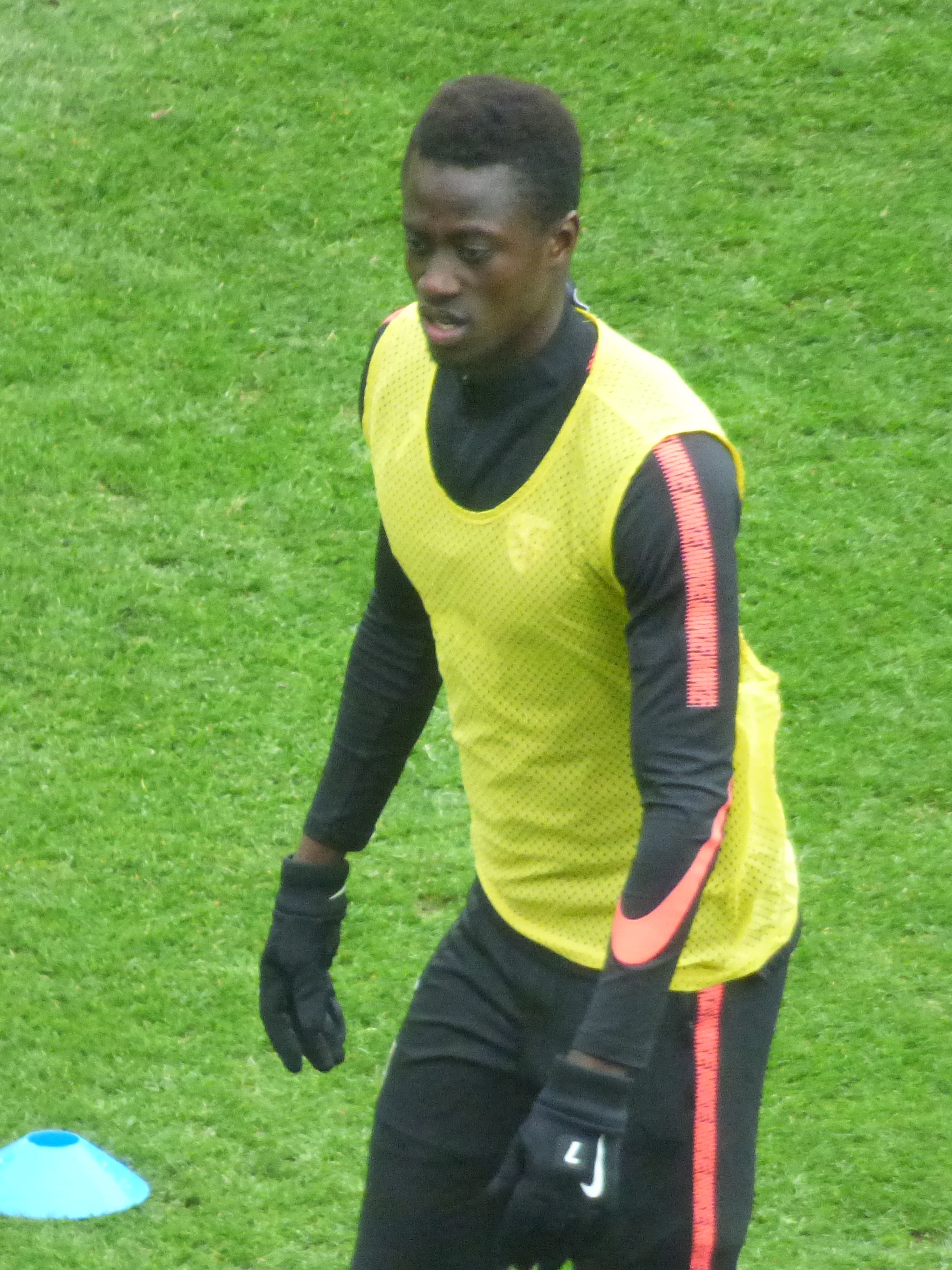 Ibrahima Niane avant le match RC Lens / FC Metz, comptant pour la vingt-quatrième journée du championnat de France de Ligue 2 2018-2019, le 9 février 2019, au Stade Bollaert-Delelis.